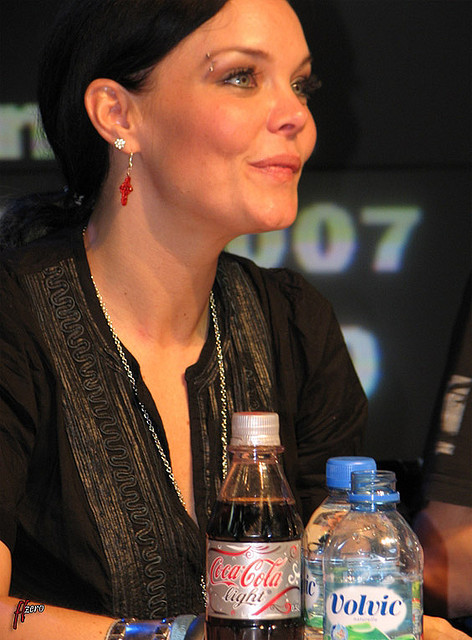 Antte Olzon, vocalista do Nightwish, em sessão de autógrafos em Hamburgo.